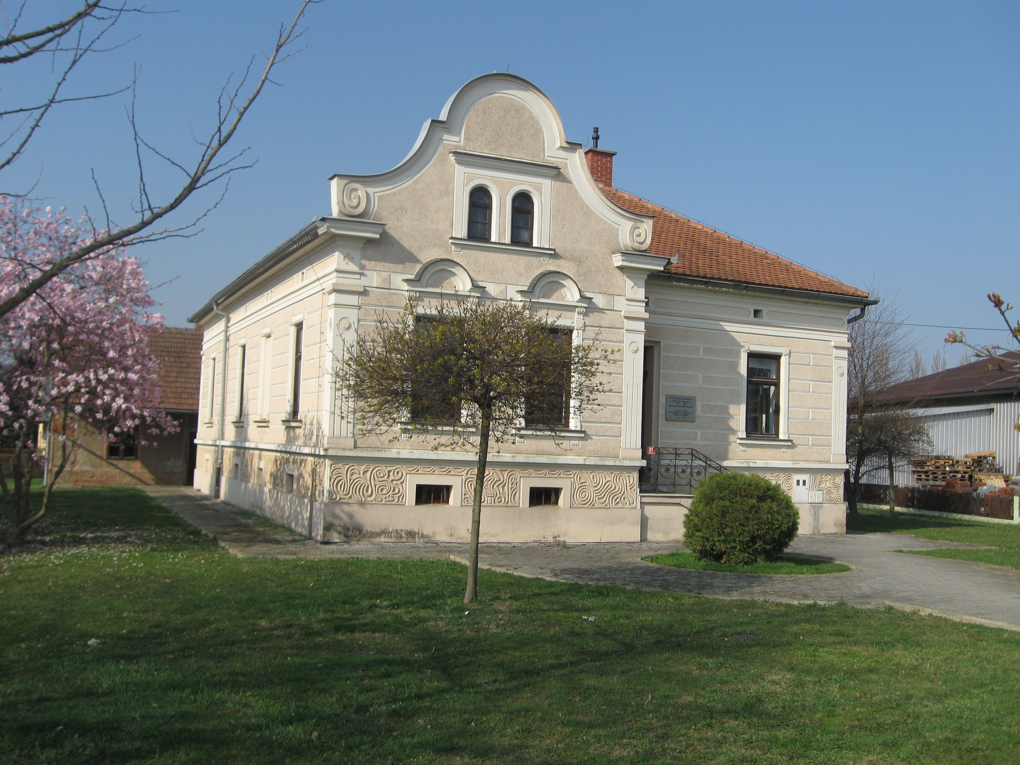 Vila v kateri je zadnja leta v Ljutomerju živel Cvetko Golar.